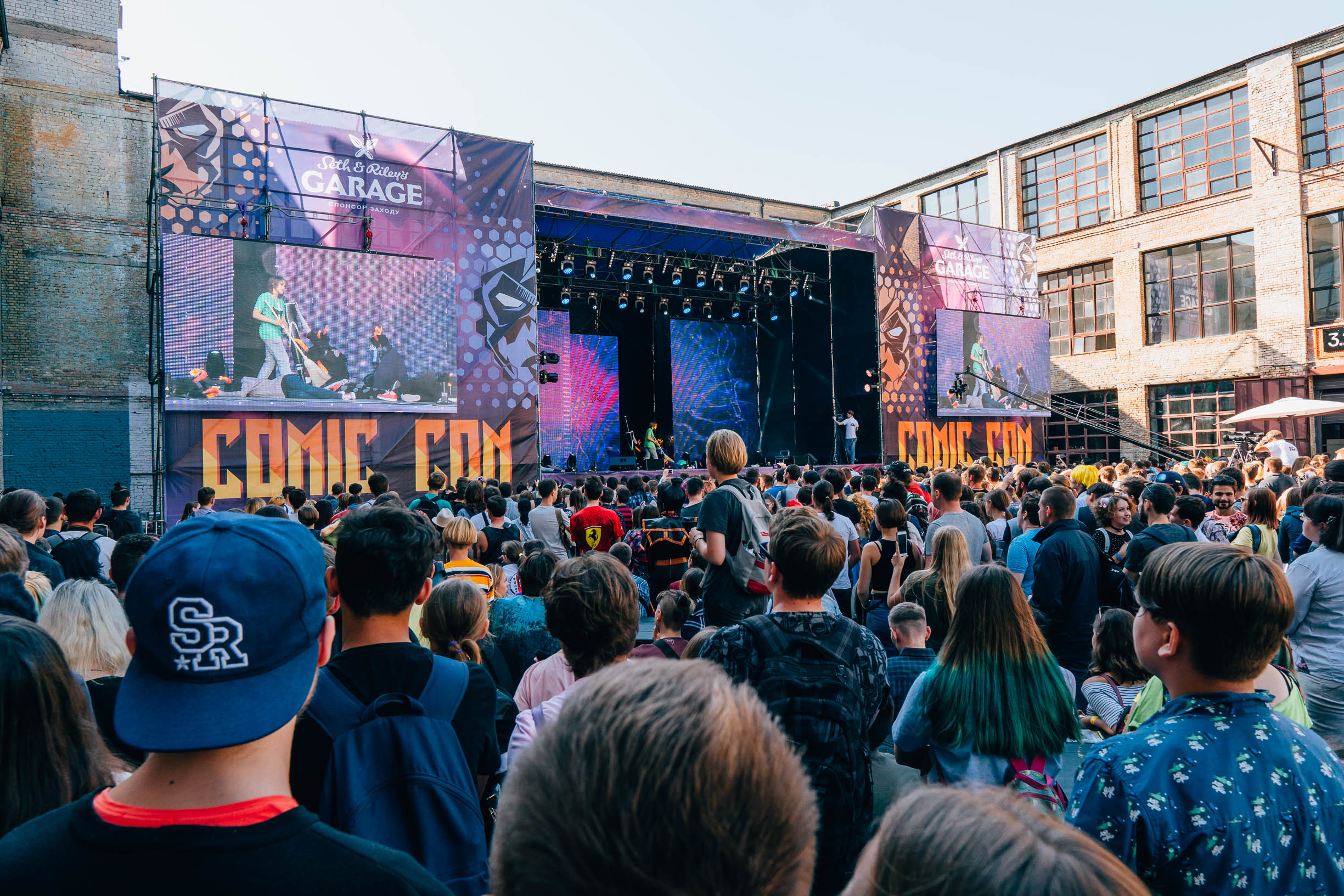 Комік Кон Україна 2018 головна сцена